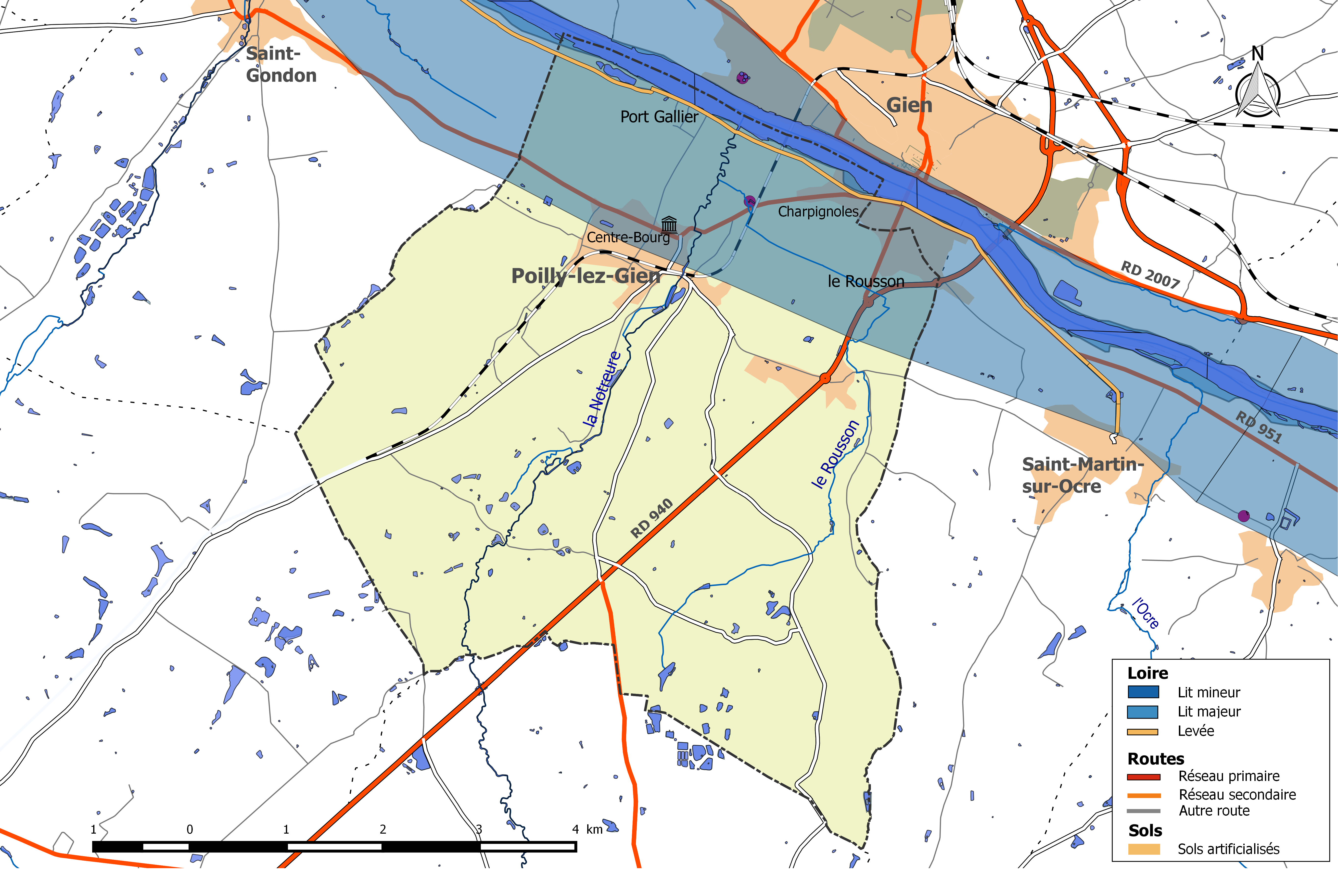 Zone inondable et réseaux hydrographique et routier de la commune de Poilly-lez-Gien